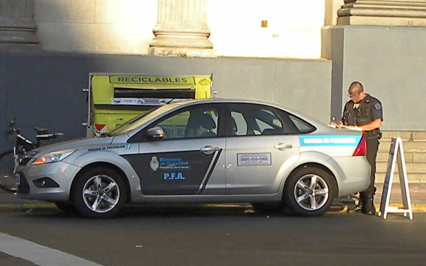 Argentina Federal Police Car